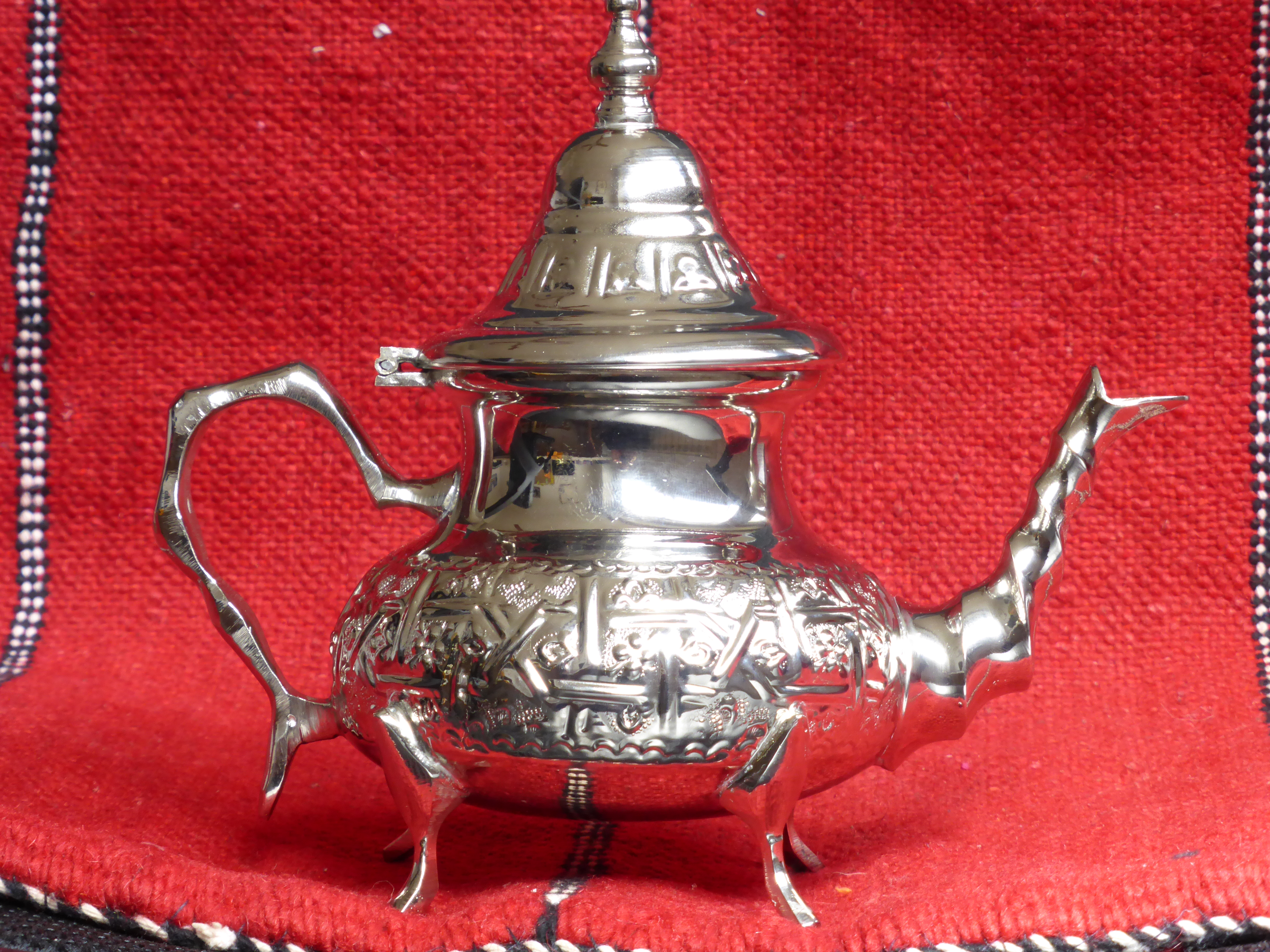 Tetera fabricada en Marruecos. Es metálica, seguramente de alpaca (aleación de cobre, zinc y níquel), con un color y brillo parecido al de la plata. Tradicionalmente se usa para servir té verde. El té marroquí se suele preparar con té verde, hierbabuena (Mentha spicata) y azúcar. El tejido rojo del fondo es bereber.